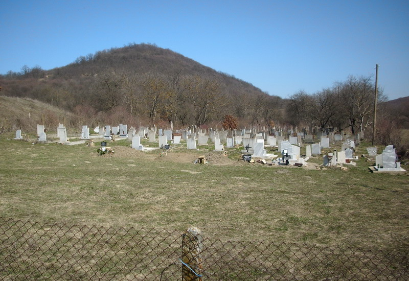 Селското гробище